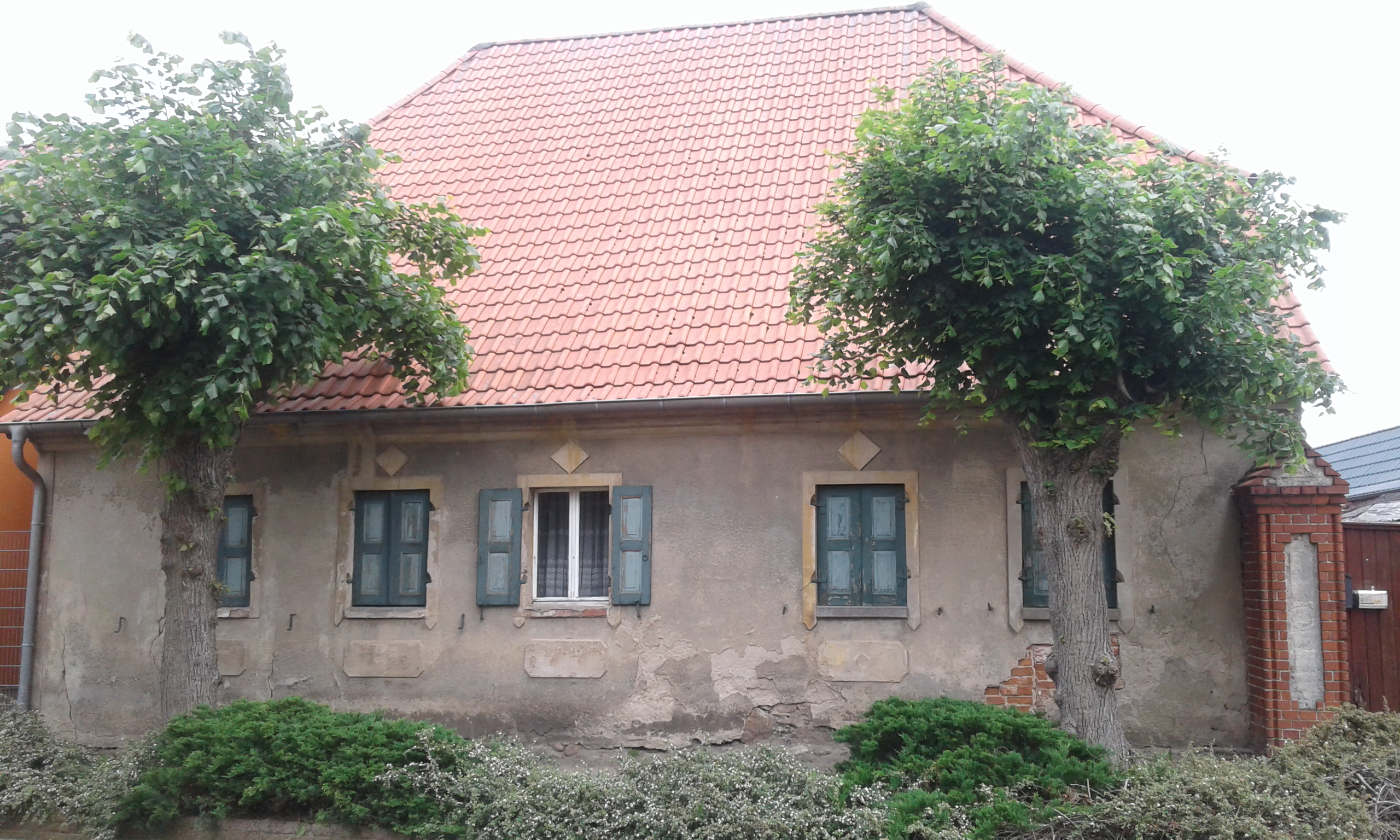 Wohnhaus